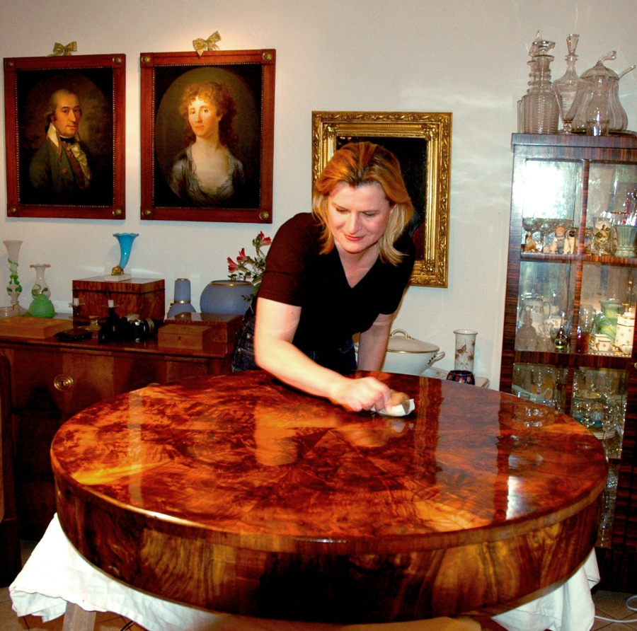 Restauratorin beim Auftragen der Schellack-Handpolitur auf ein Objekt